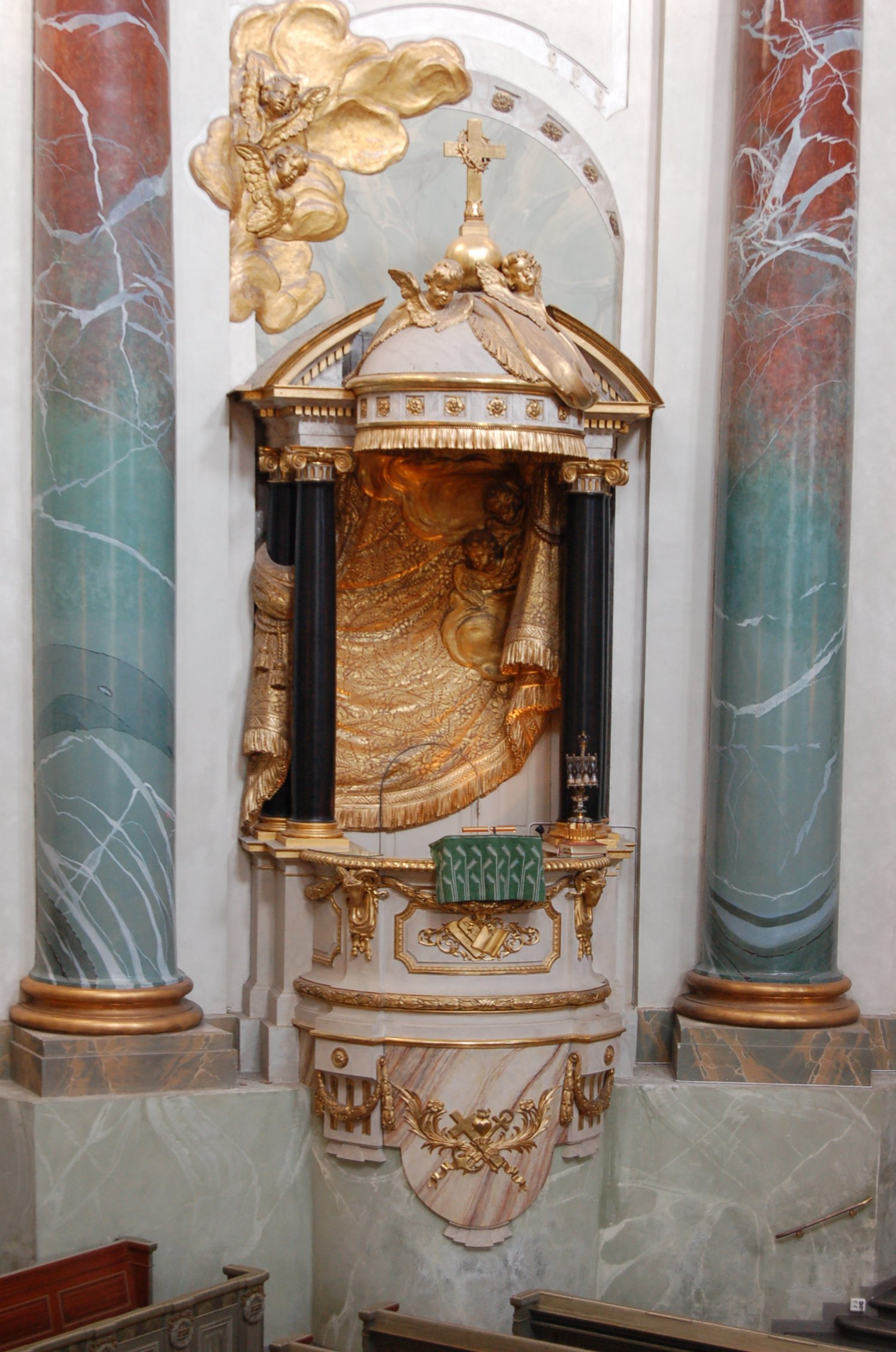 Predikstolen i Hedvig Eleonora kyrka i Stockholm.